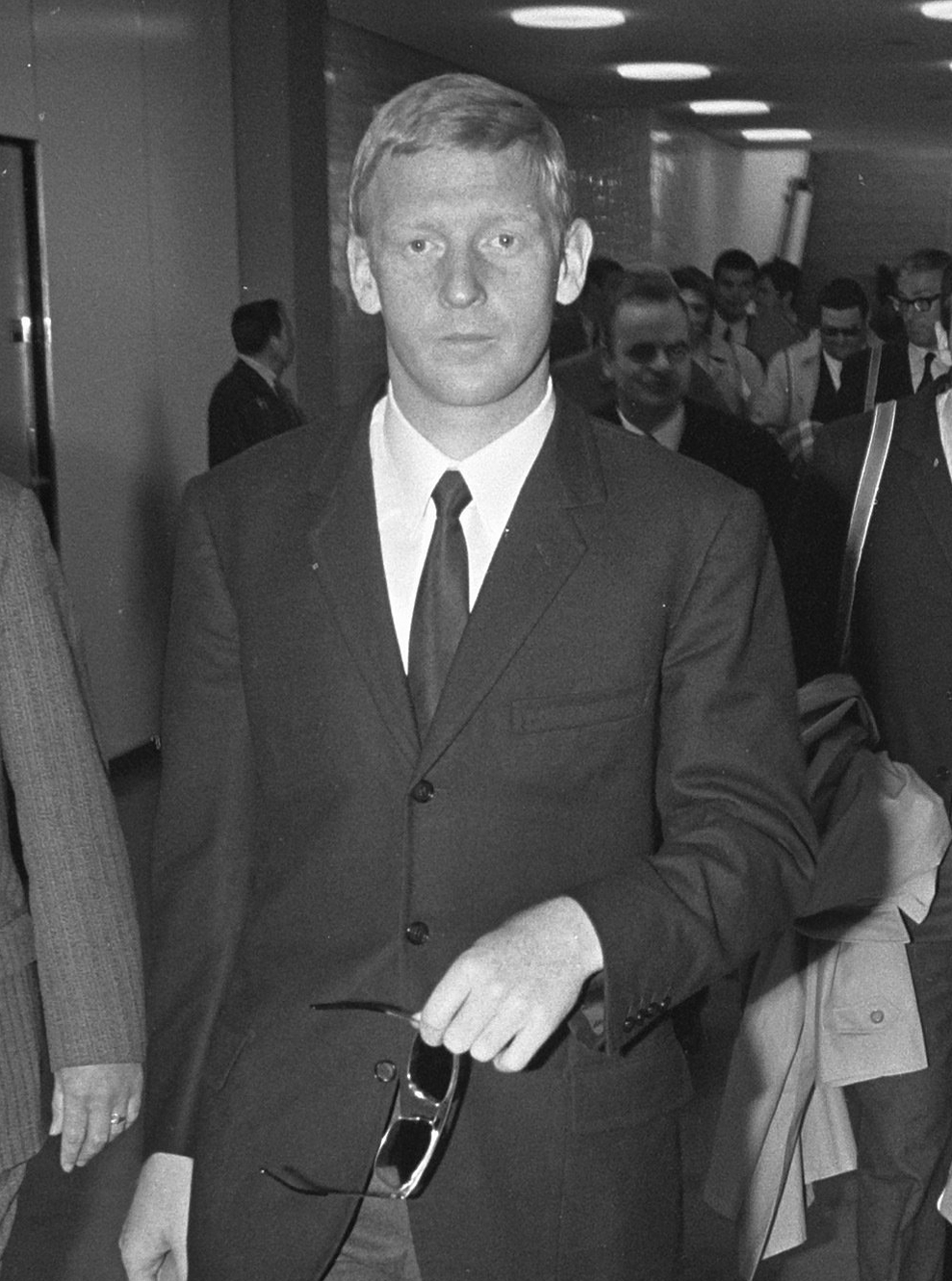 Karl-Heinz Schnellinger in Nederland voor de Europacup II finale 1968 tussen AC Milan en Hamburger SV